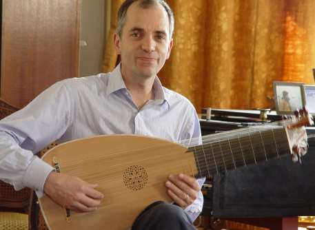 Louis Pernot luthiste